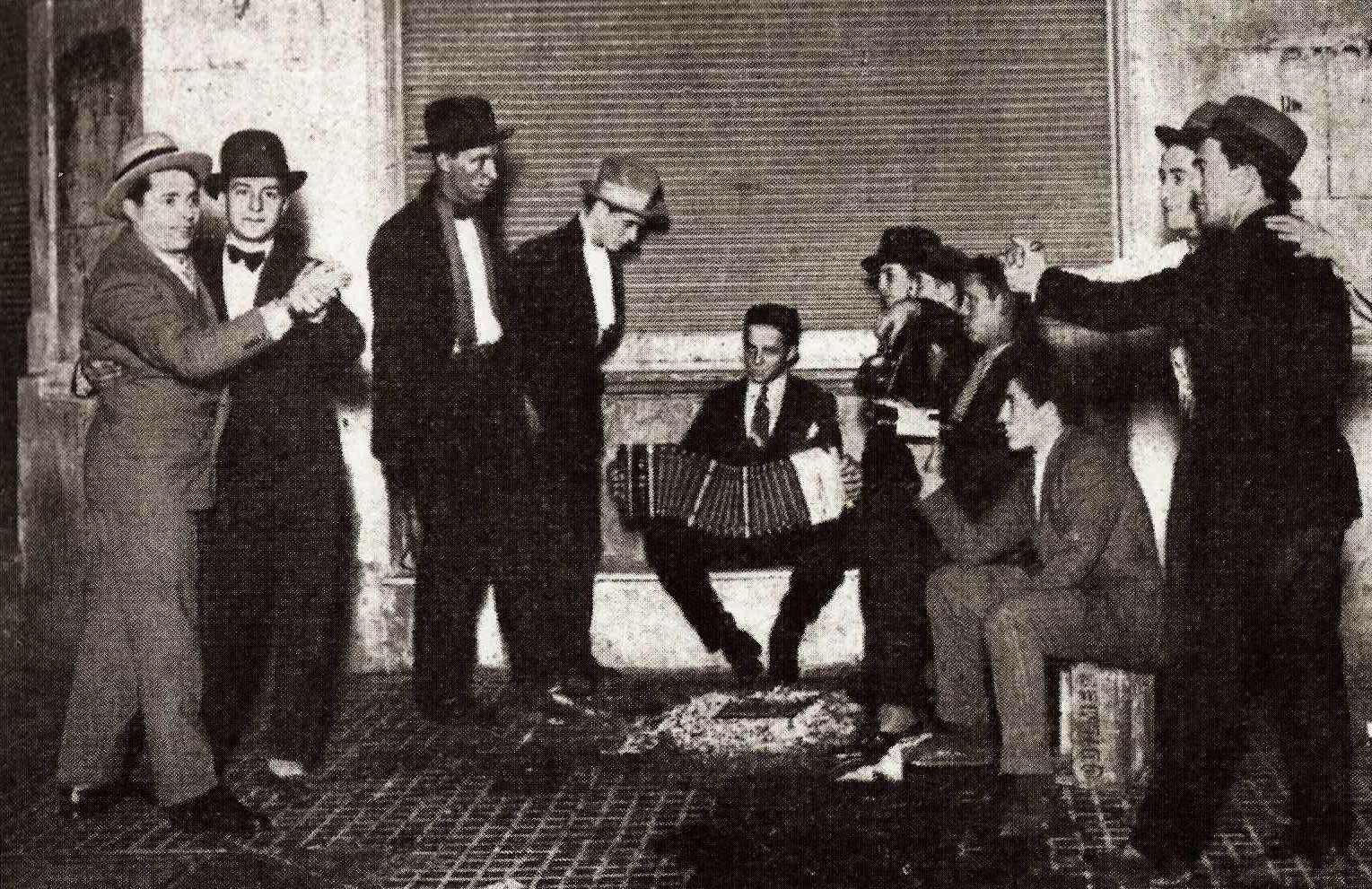 Tango between men in Buenos-aires